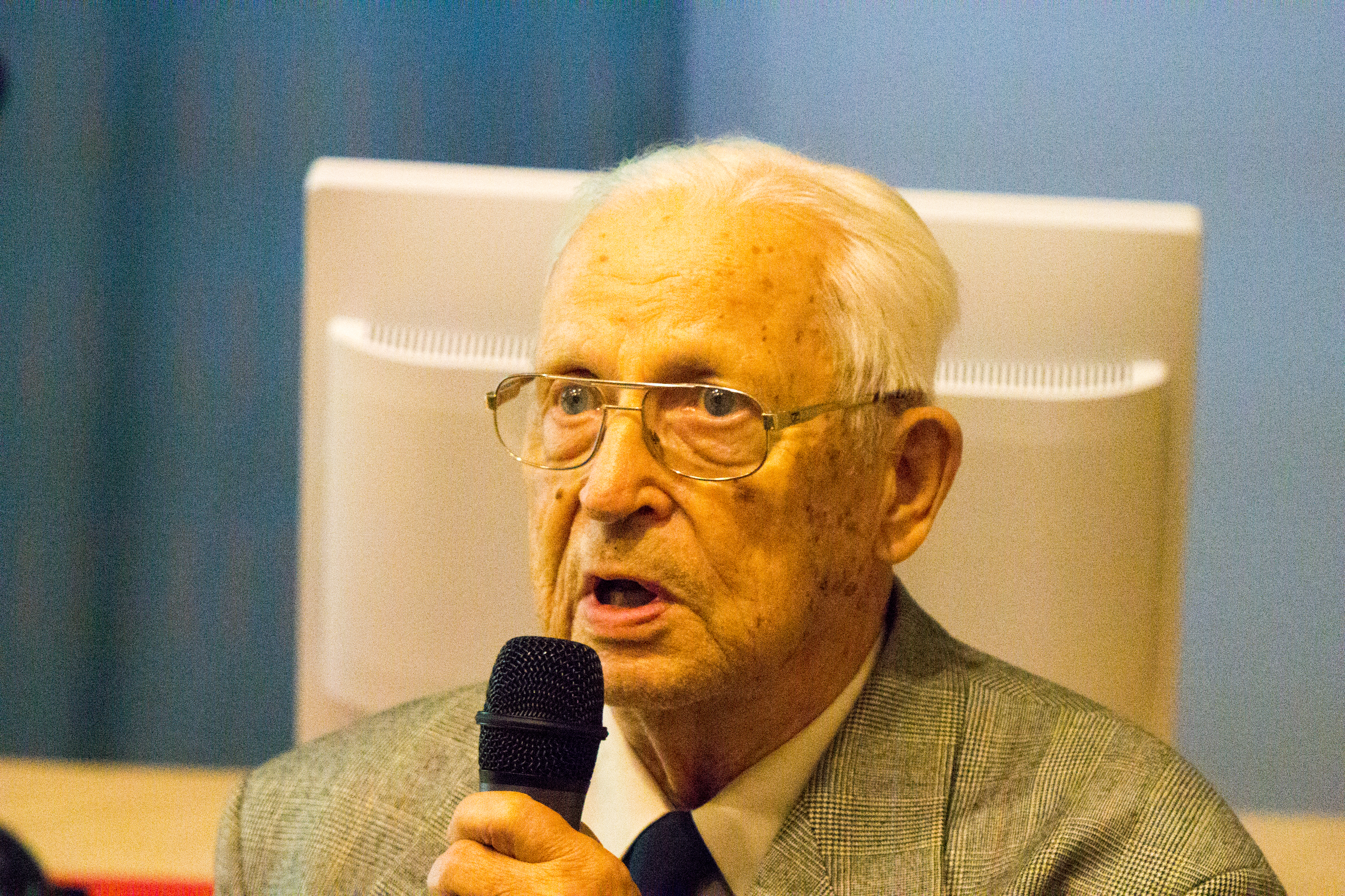 Ilmari koppinen veteraaniurheilija